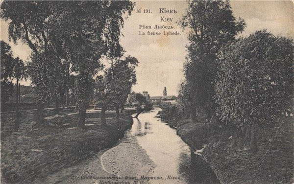 Річка Либідь у Києві на поштівці початку ХХ ст.